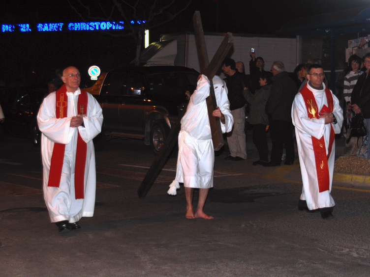 Calvi - A Granitola 2009